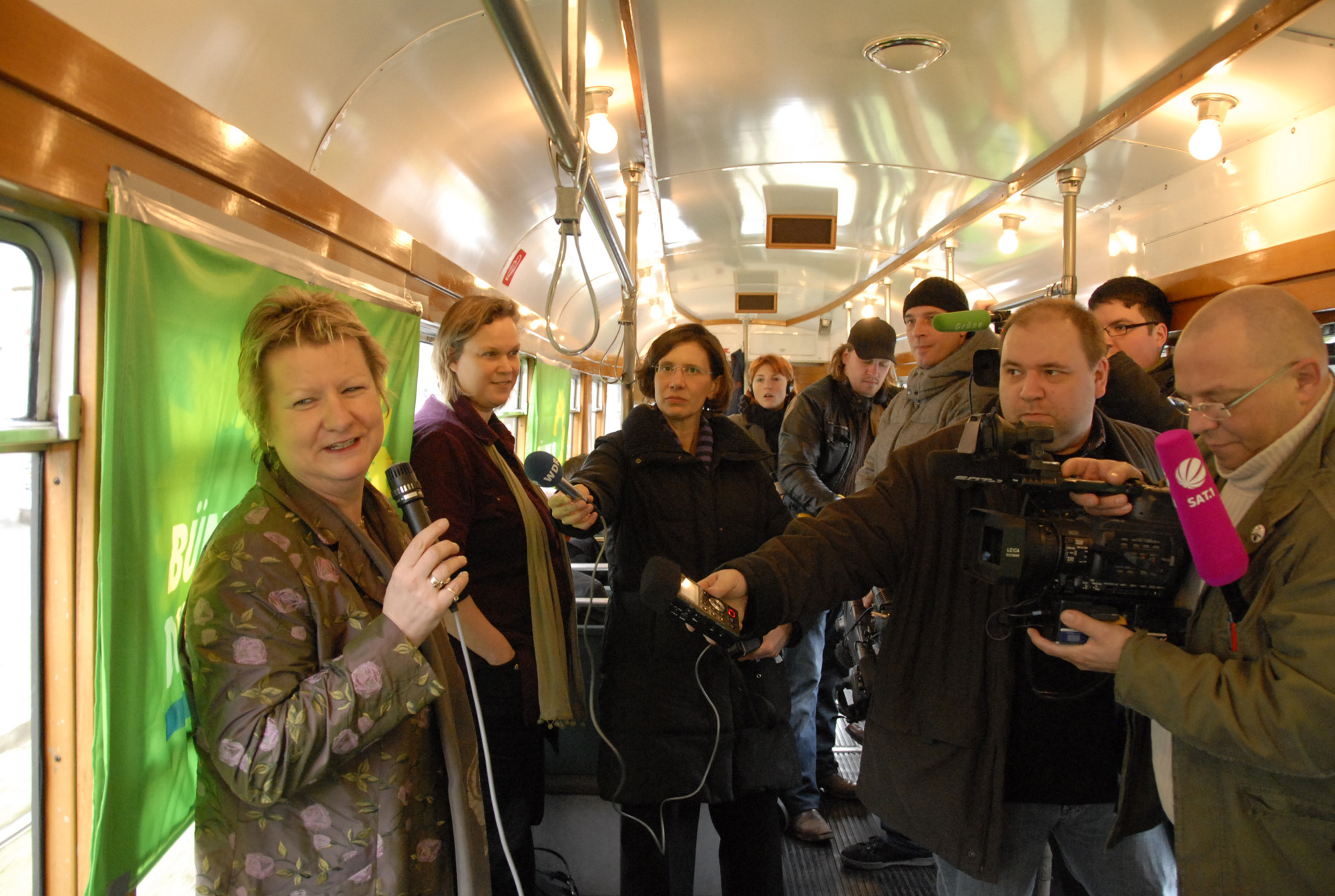 Die Spitzenkandidatin der Grünen zur Landtagswahl 2010 in NRW Sylvia Löhrmann stellt die Wahlkampagne in einer Straßenbahn vor.